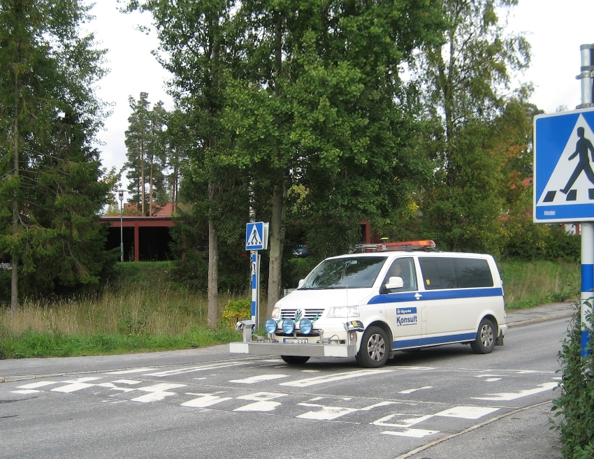 Profilograf över fartdämpande vägbula